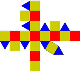 развертка ромбокубоктаэдра